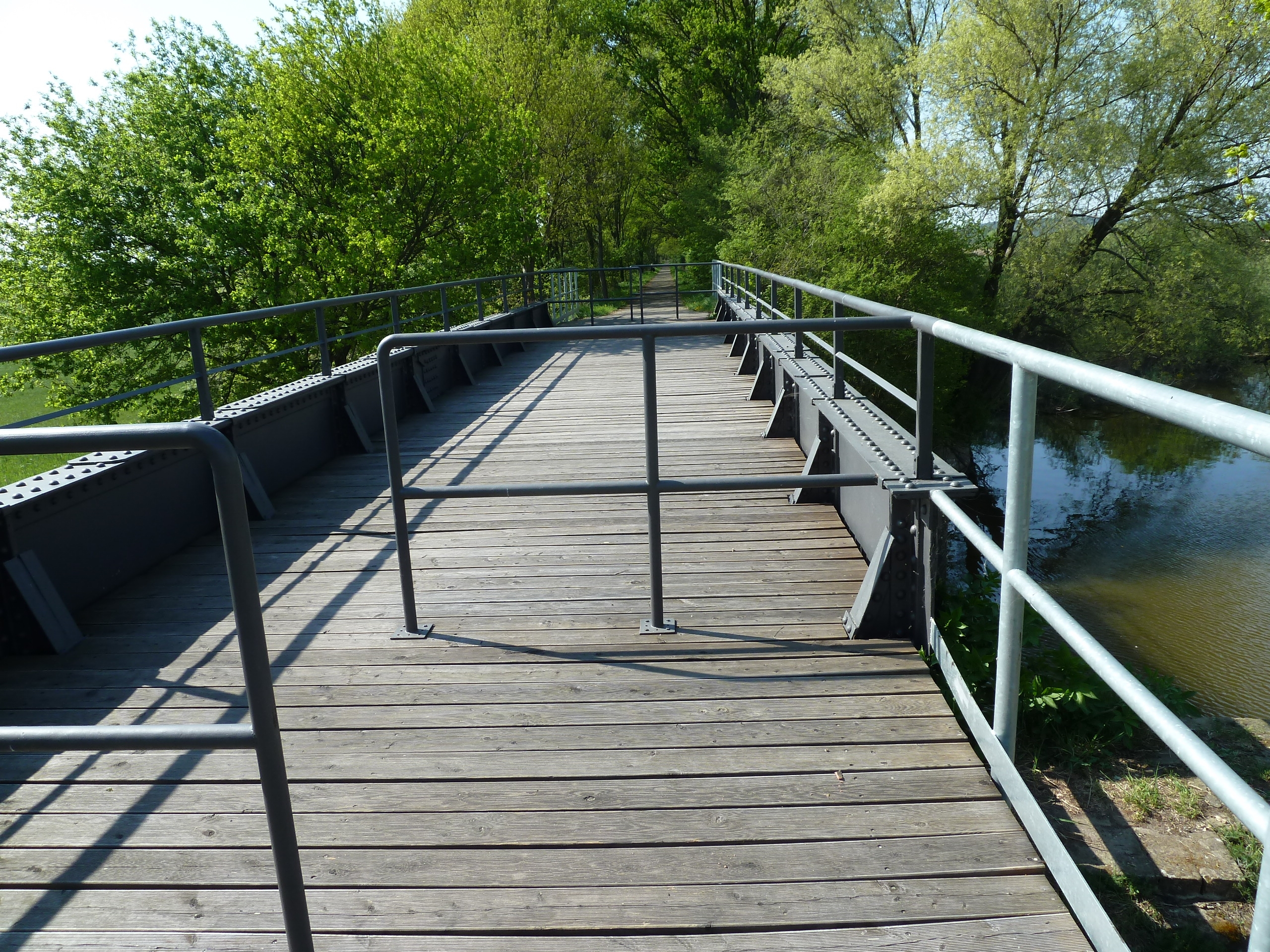 Brücke der Westhavelländischen Kreisbahn, heute Radweg, bei Ketzür